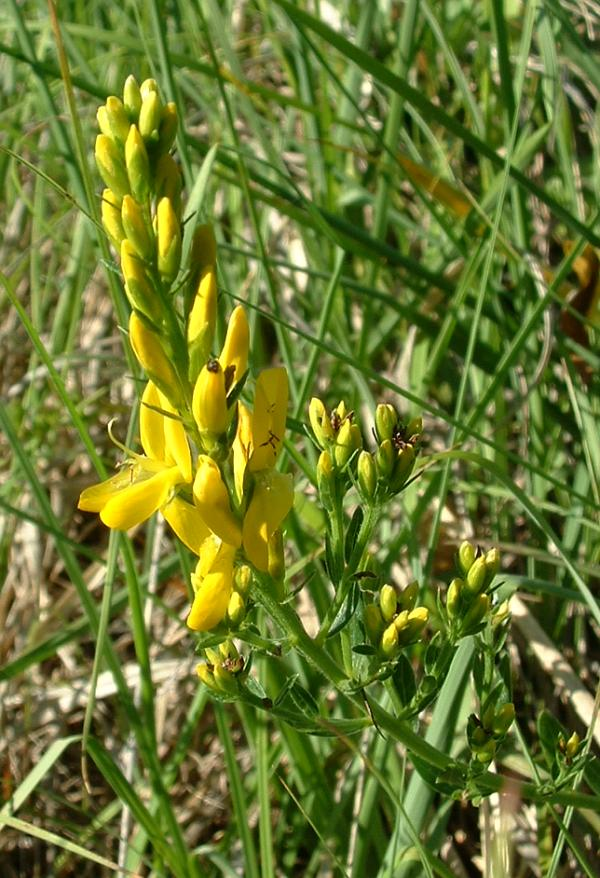 Genêt des teinturiers, photo J.F. Gaffard, Bucey-lès-Gy, juin 2004